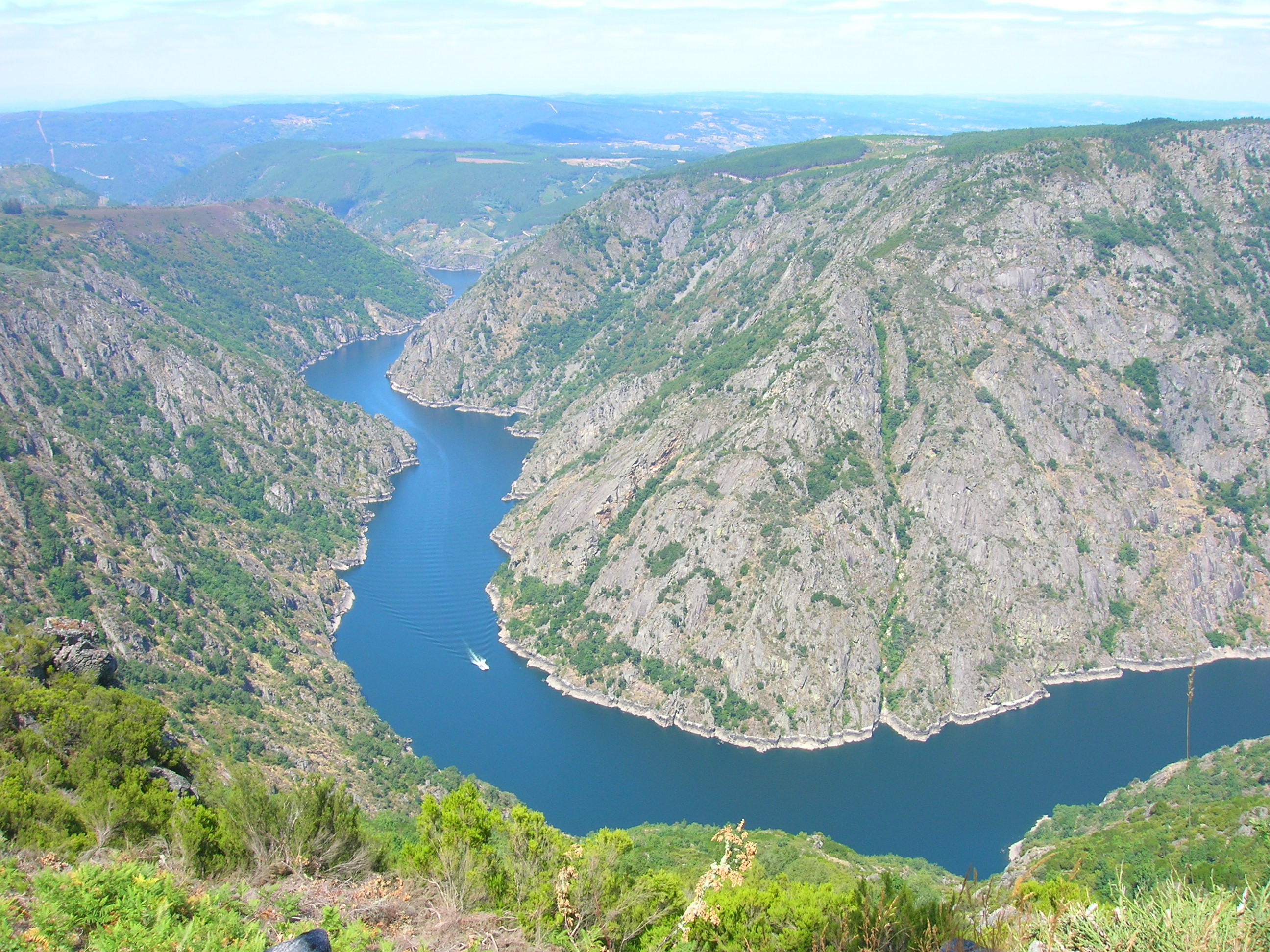 Vista del Cañon del Rio Sil desde el mirador de Cabezoas. EL catamarán turístico remonta el río en la curva próxima al embarcadero de Santo Estevo. Información sobre su ubicación en [1]